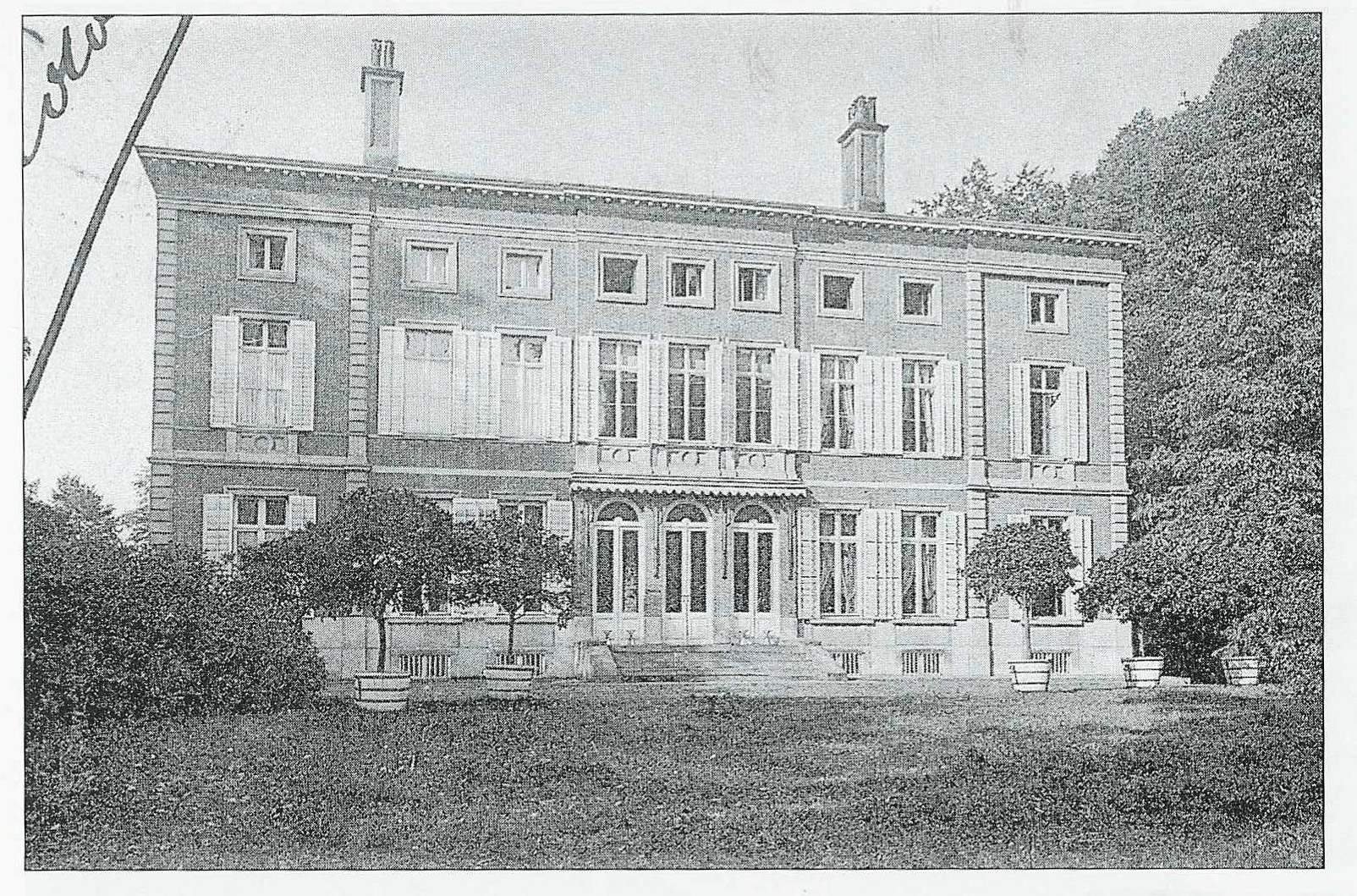 Voormalig Kasteel van Astene - Deinze- Oost-Vlaanderen - België, nu "De Ceder"